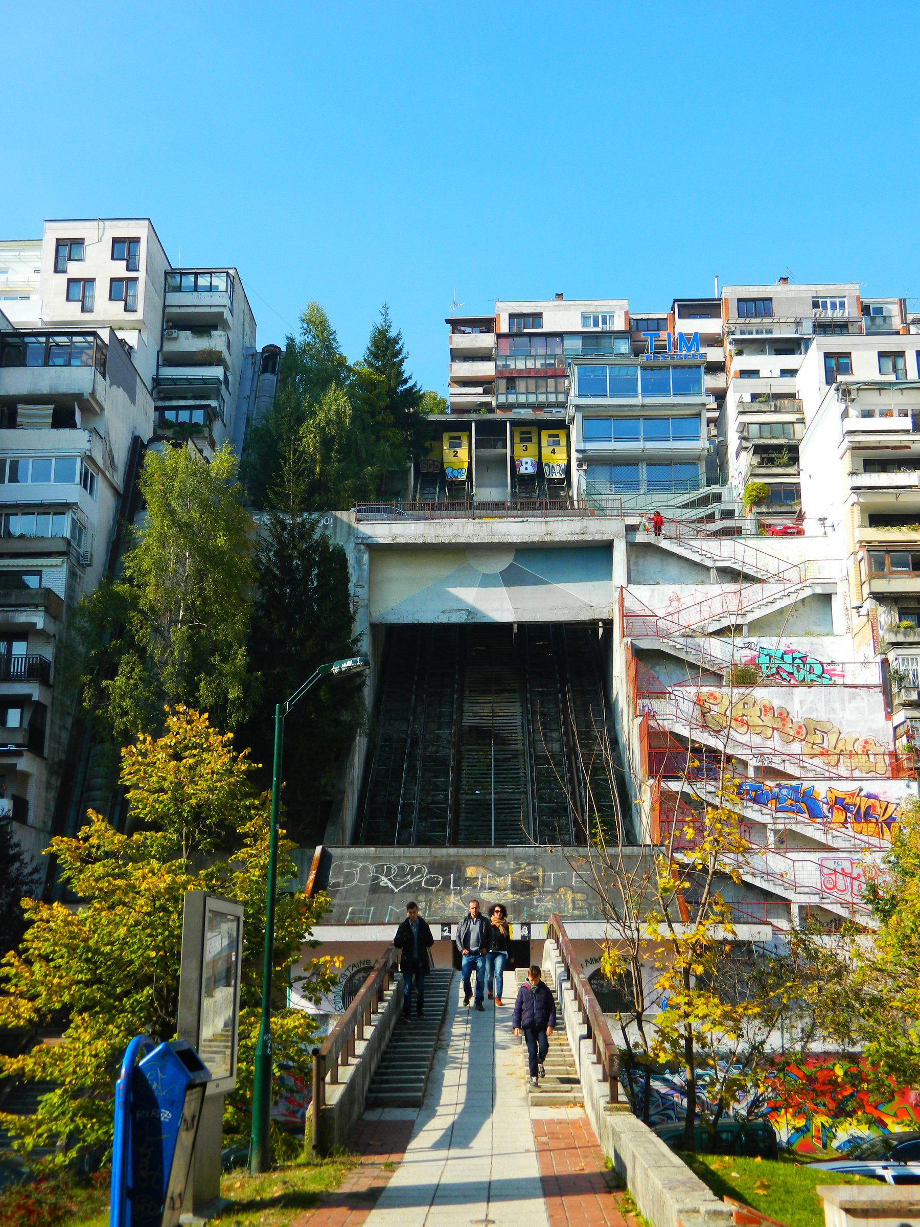 Funicular 02